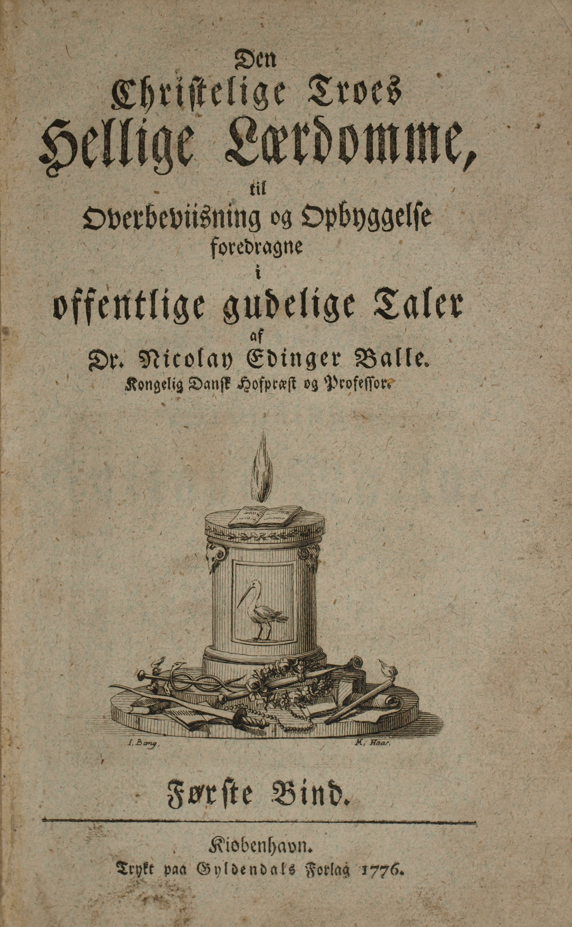 Titelbladet til Nicolai Edinger Balles Den christelige troes hellige lærdomme til overbeviisning og opbyggelse foredragne i offentlige gudelige taler fra 1776.